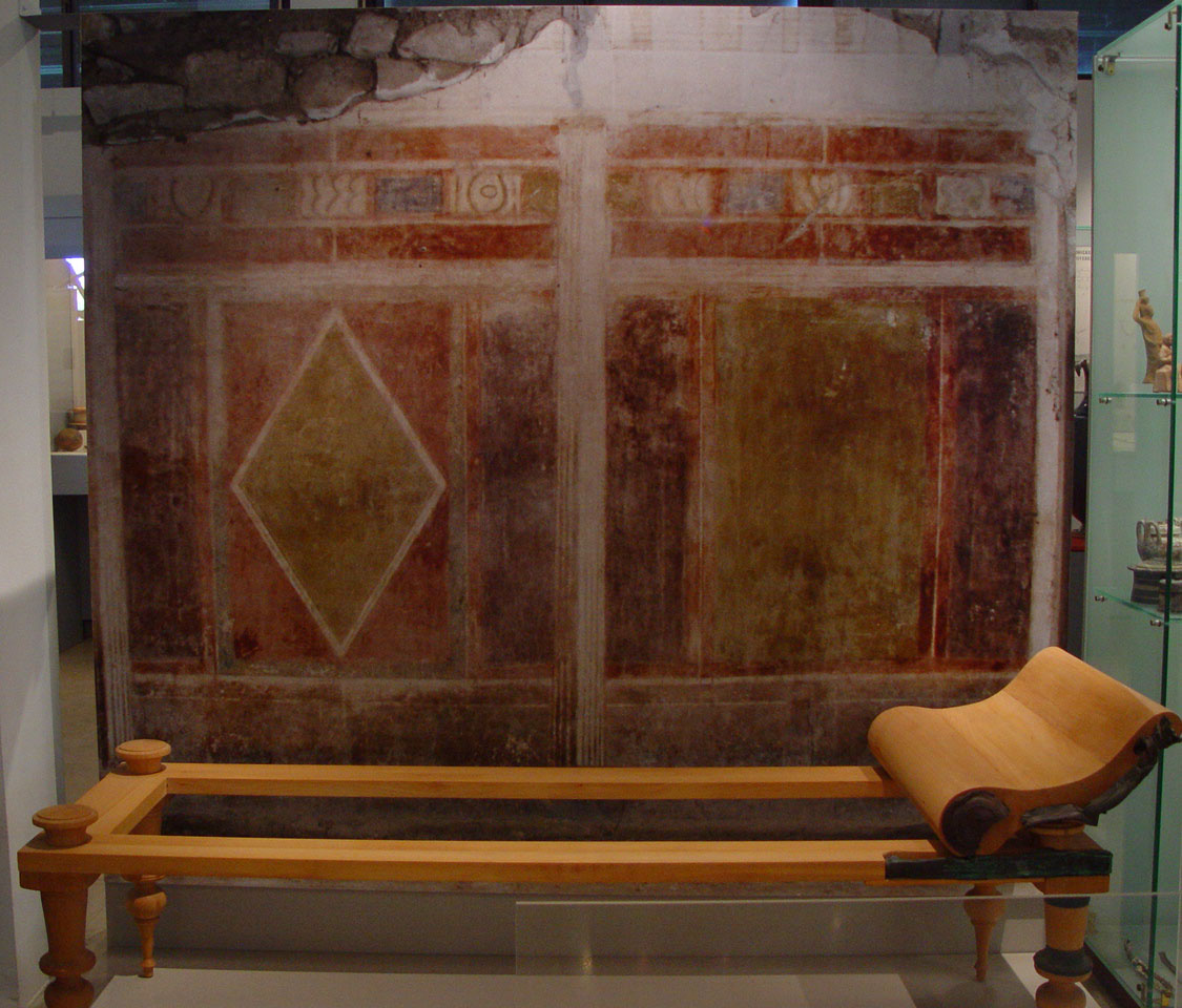 Fresco de una casa helenística de Anfípolis Amphipolis frescoes from a late hellenistic house (archaeological museum of Amphipolis). Photograph taken by Marsyas on 06/16/2002.